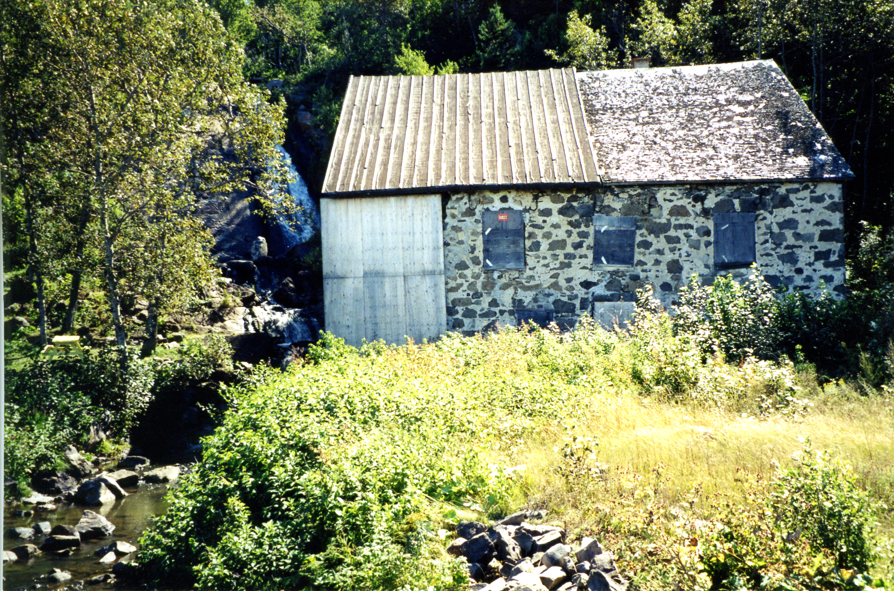 Moulin à eau du Petit-Sault, situé à L'Isle-Verte (Bas-Saint-Laurent, Québec), aussi connu sous le nom de Moulin Robert-Lagacé. Quand on compare cette photo de 2001 avec la photo de 2009, il est évident que le moulin est laissé dangeureusement à l'abandon. Moulin à farine.